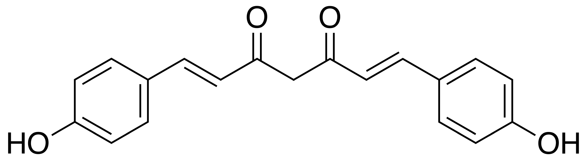 Skeletal structure of bisdemethoxycurcumin, a curcuminoid.